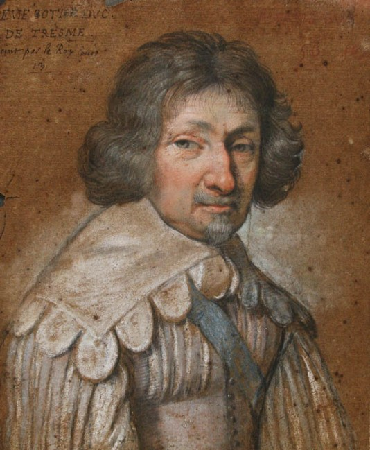 Portrait de René Potier (1579-1670), duc de Tresmes, réalisé au pastel par le roi Louis XIII